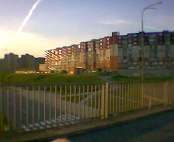 Sídlisko Ťahanovce z "Ťahanovského nadchodu"...